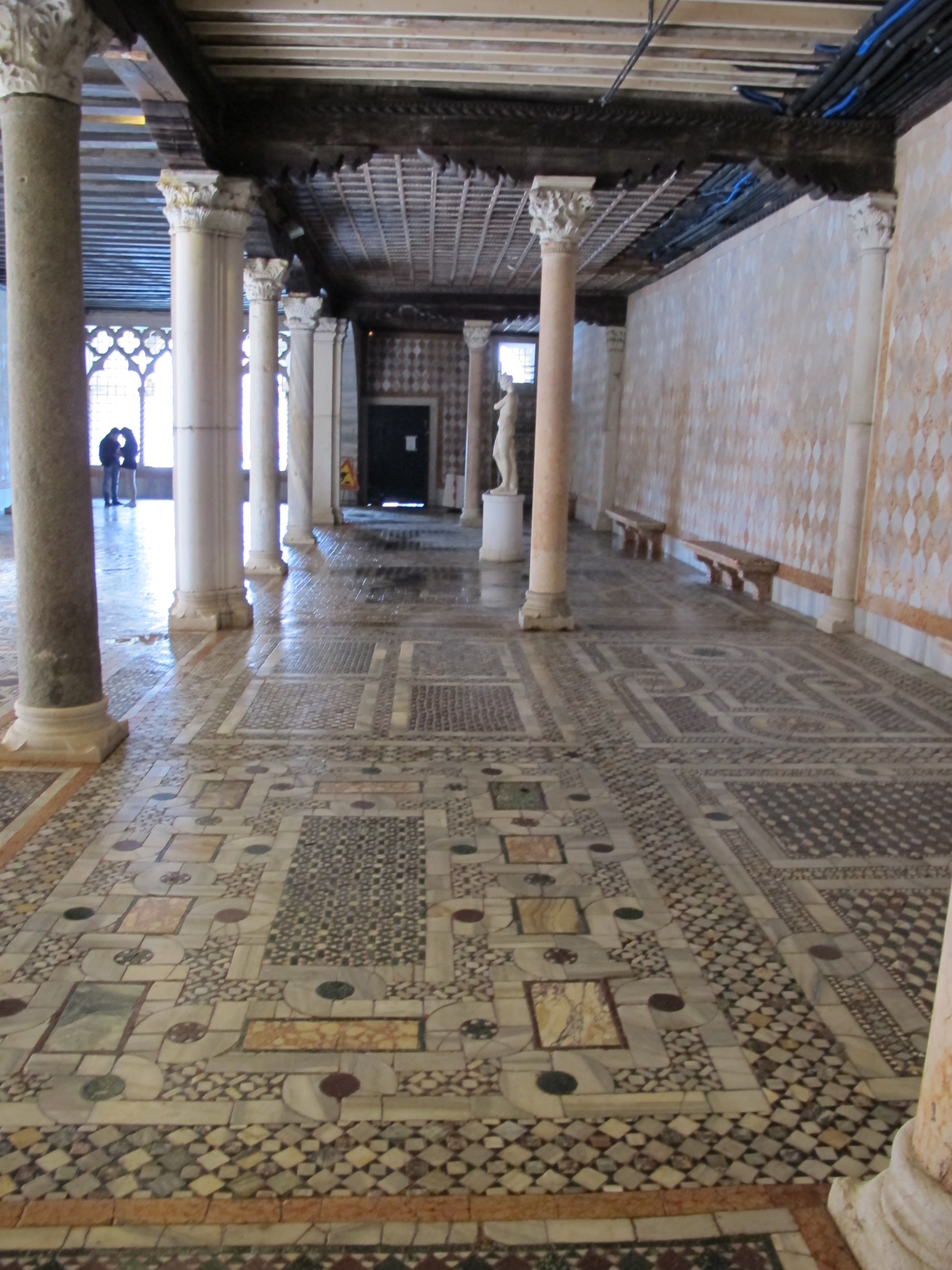 Il cortile della Ca' d'oro a Venezia.